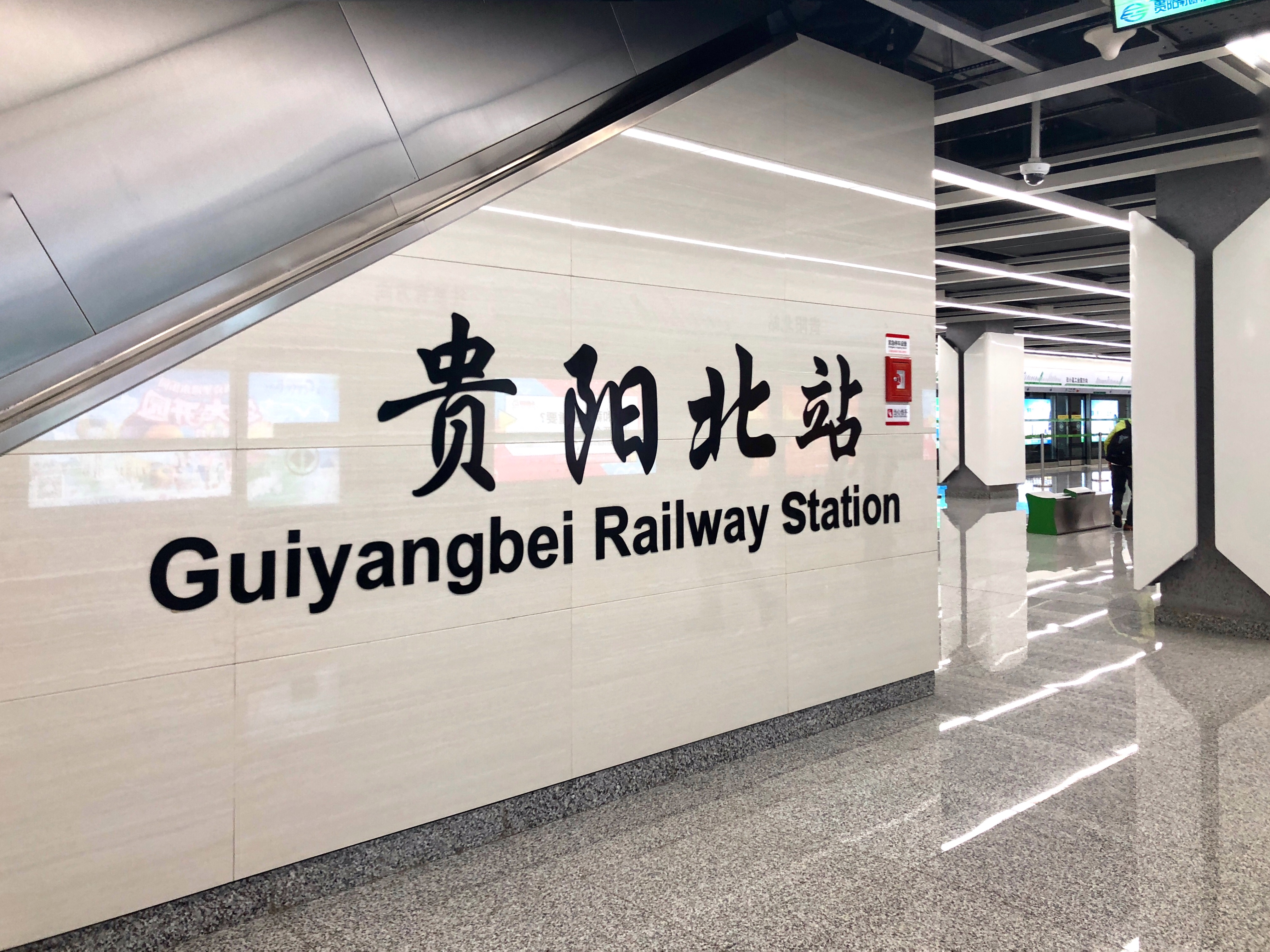 中文（中国大陆）: 贵阳地铁1号线贵阳北站